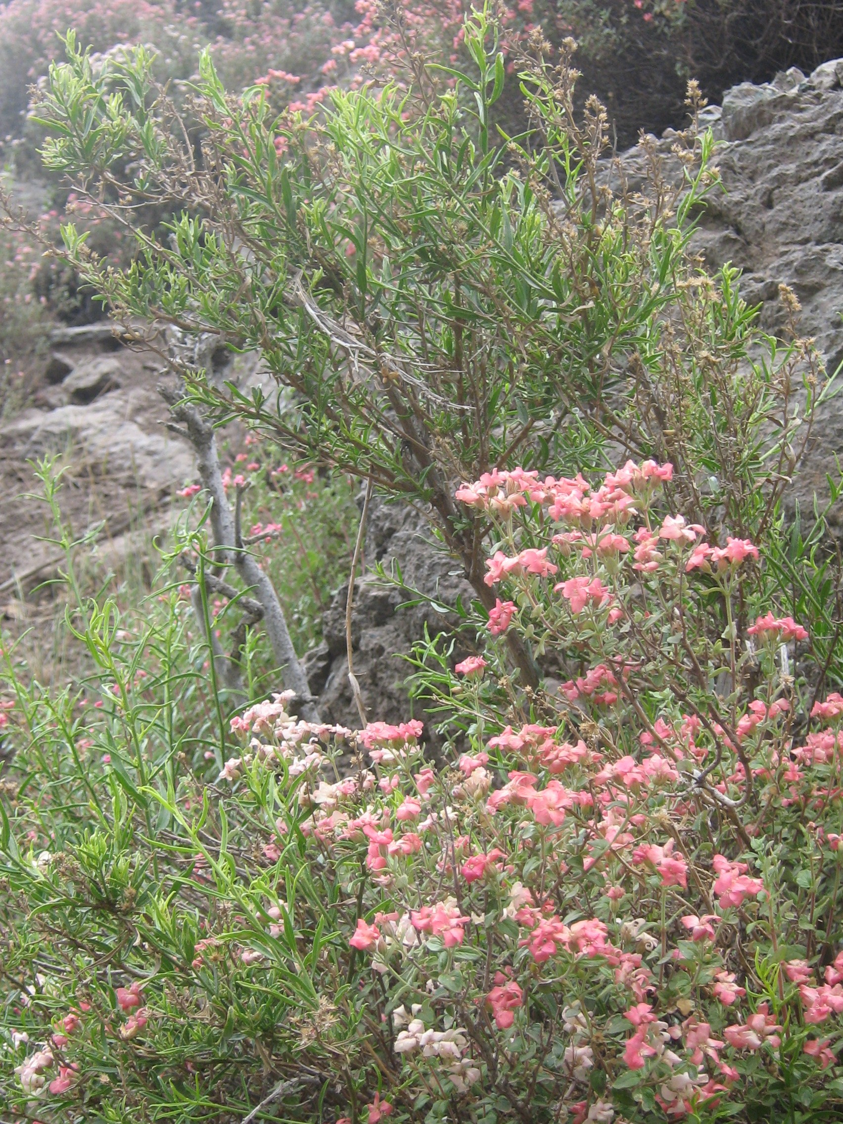 Viviania (Vivianiaceae), monotypic genus Geraniales